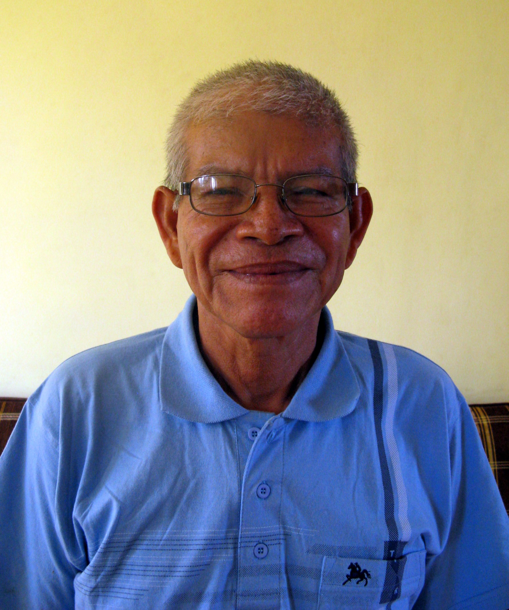 Гиллермо Аревало